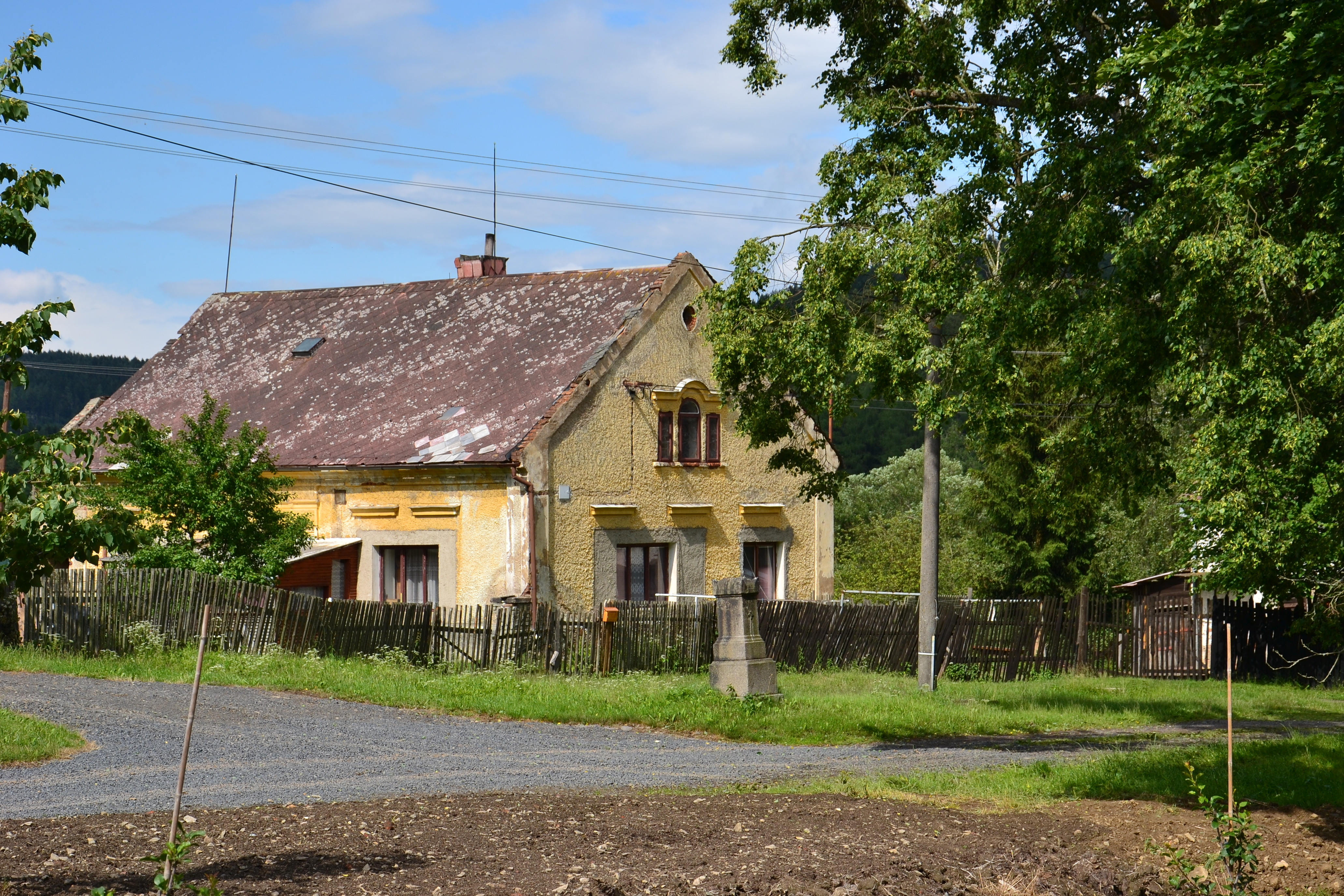 Dům čp. 3 na návsi